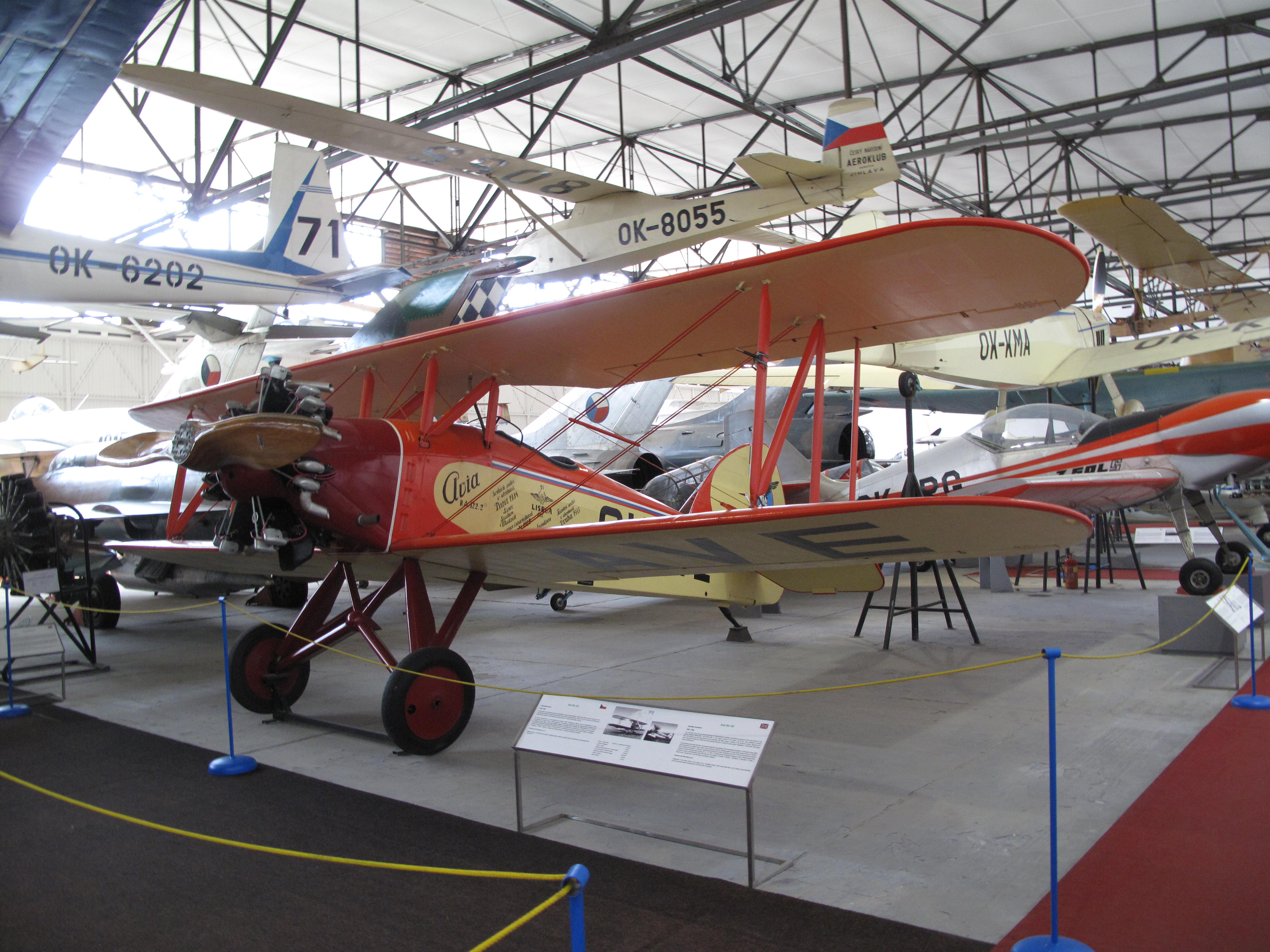 Avia B.A.122.2 ; Letecké muzeum Kbely